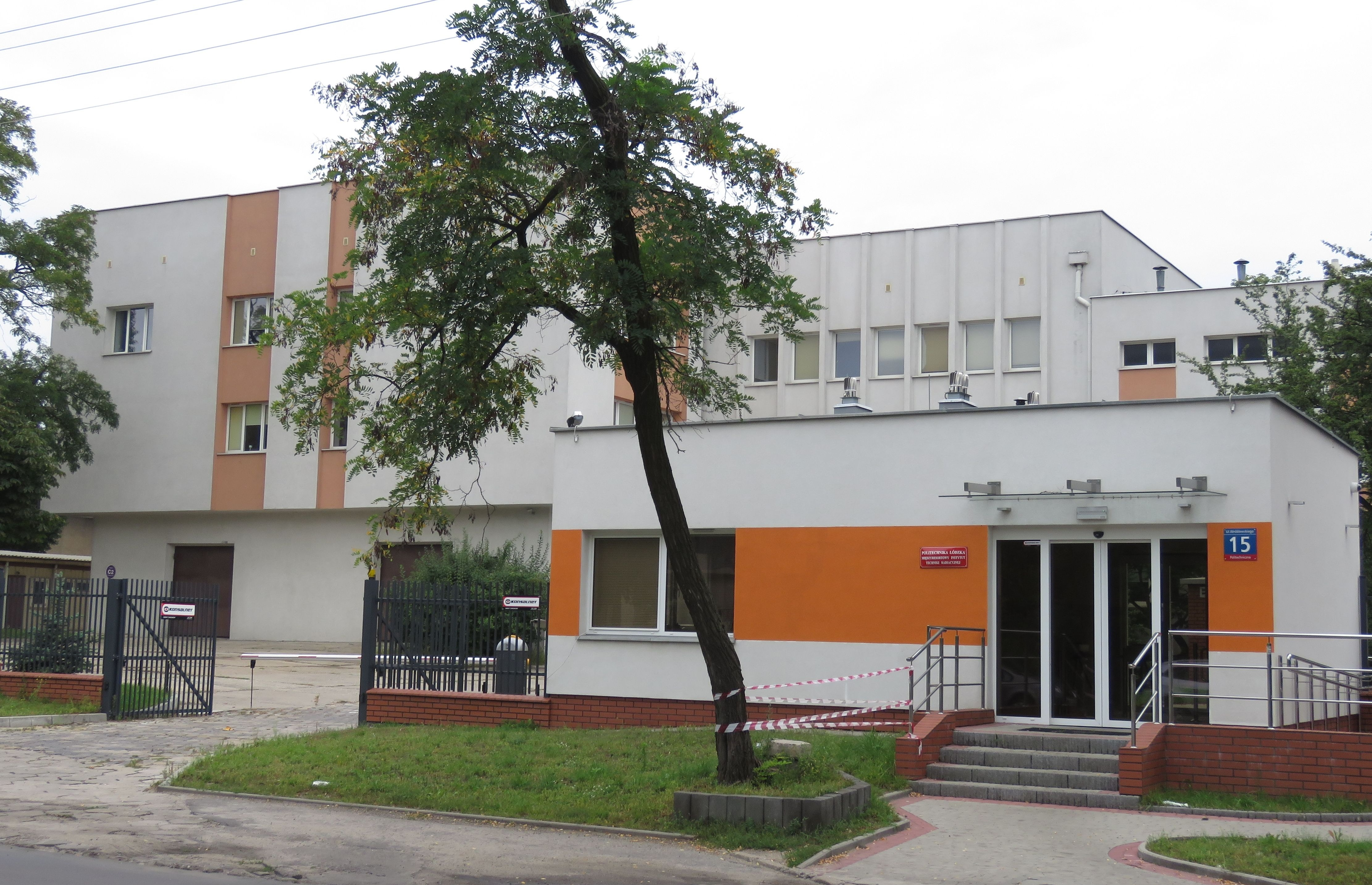 Instytut Techniki Radiacyjnej Politechniki Łódzkiej